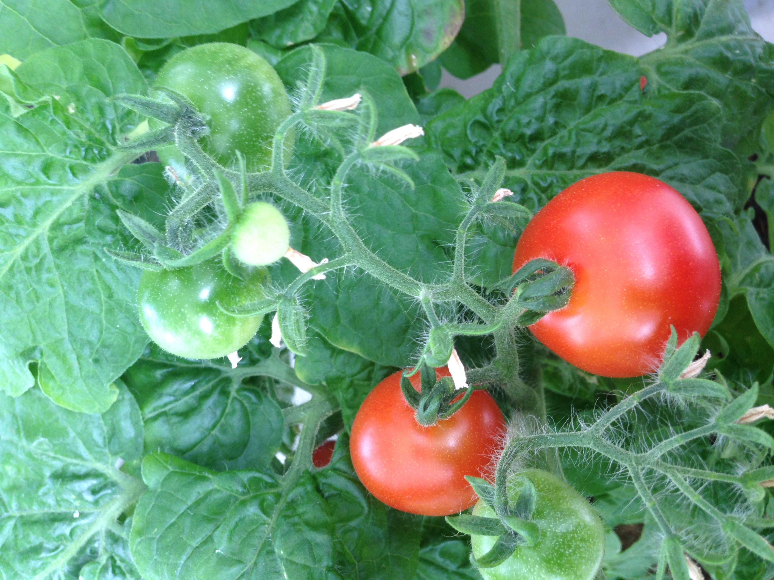 Çeri domates saksıda büyüyor